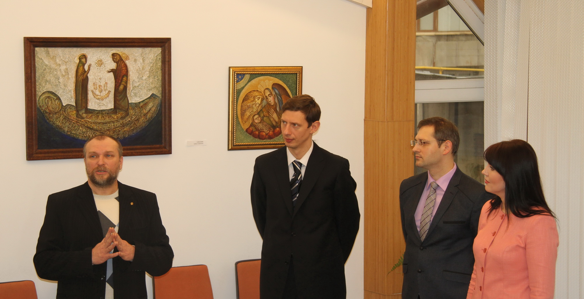 Открытие персональной выставки Юрия Салко в Министерстве иностранных дел ПМР